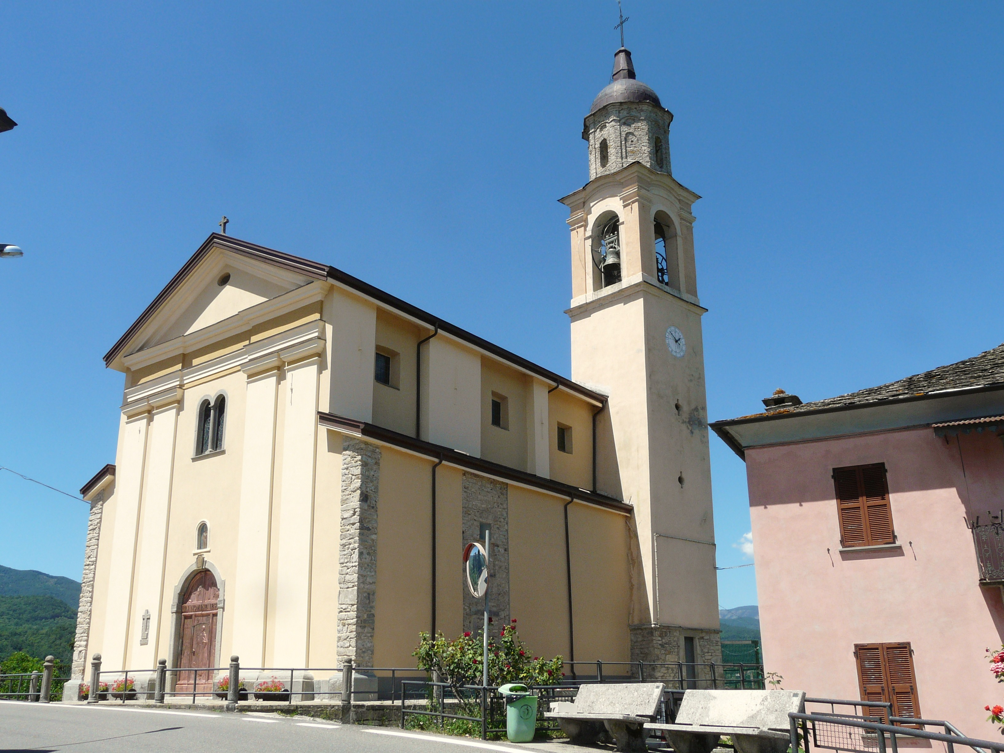 Chiesa di San Bernardino da Siena, Tornolo, Emilia Romagna, Italia